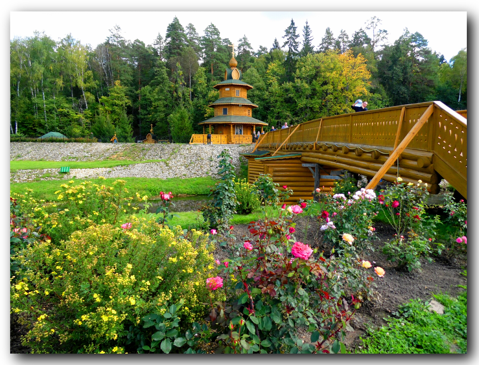 С того времени, и правда, многие стали ездить на это место и купаться. Паломничество выглядело примерно так, как описала свое посещение саровского источника в советское время одна из его участниц: «Чем ближе мы подходили к главным источникам, тем чаще попадались прохожие. Многие из них, видимо, прошли десятки верст пешком, некоторые вели с собой детей. Шли сосредоточенно, робко, стараясь быть незамеченными, в одиночку. Но в каждом сердце теплился объединяющий всех огонек веры в дарованную угоднику Божию благодать исцеления». Источник: сайт